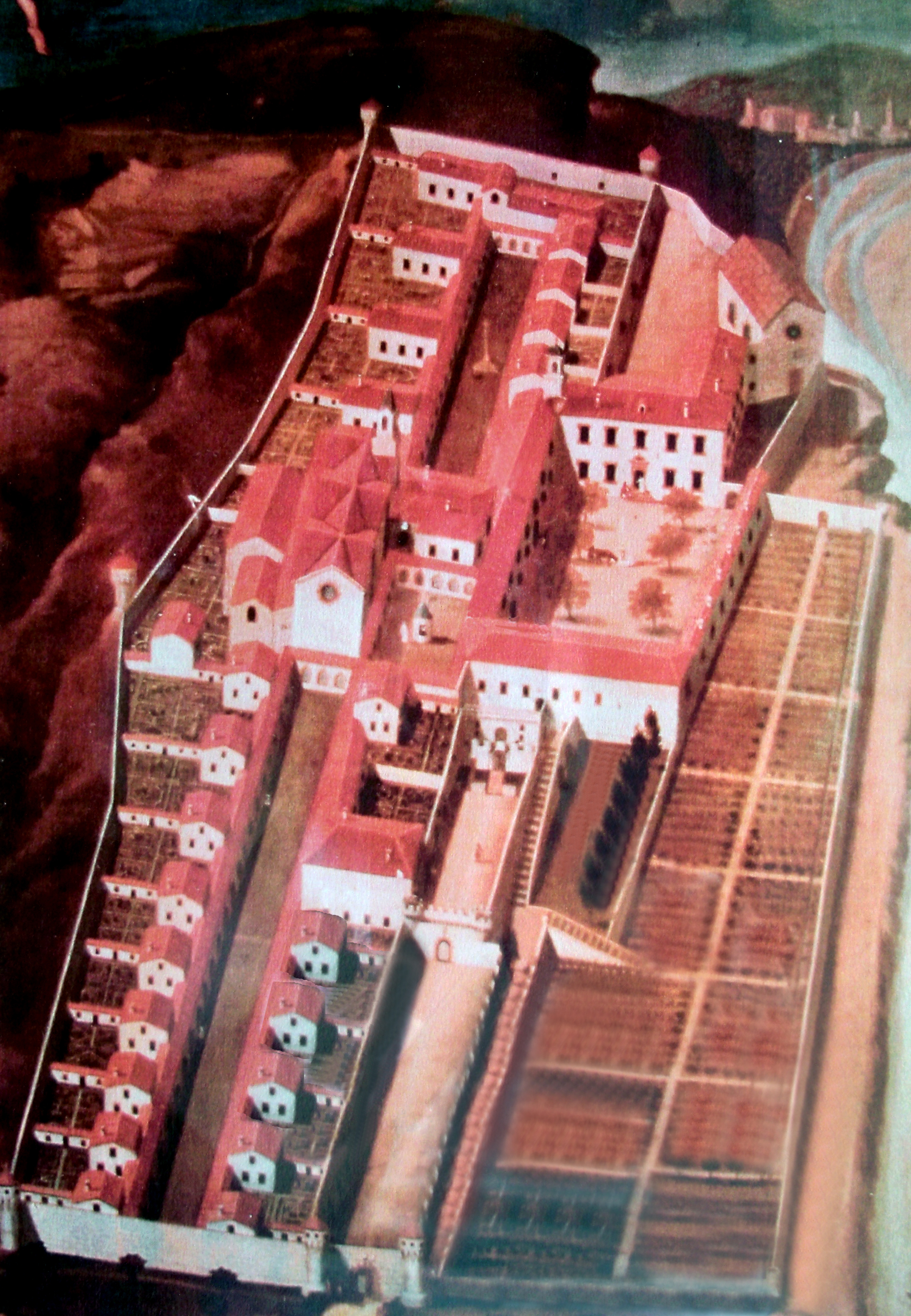 Plan de Chartreuse de Bonpas, avant la destruction de l'église